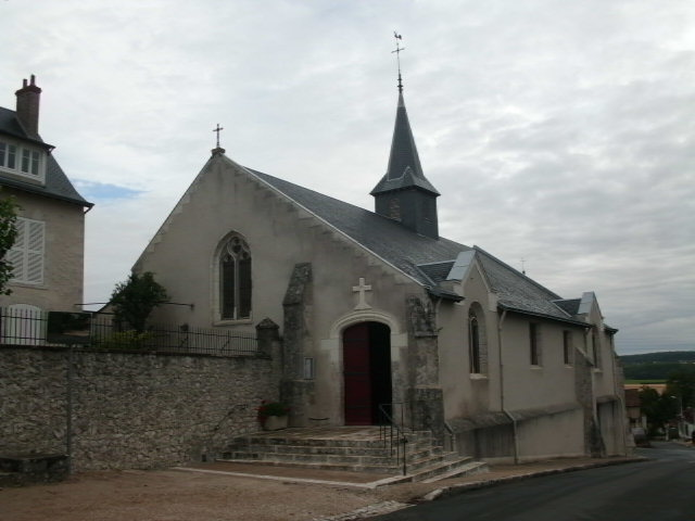 Eglise Saint-Denis de Coulanges (Loir-et-Cher)